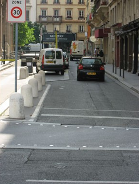 Photo d'une rue avec la zone 30